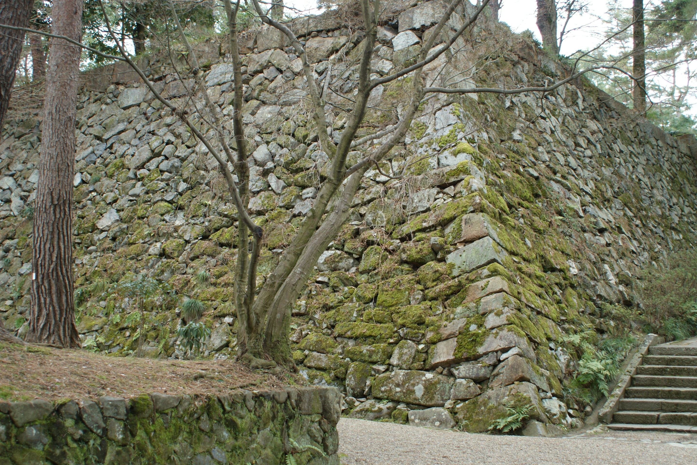 亀山城石垣